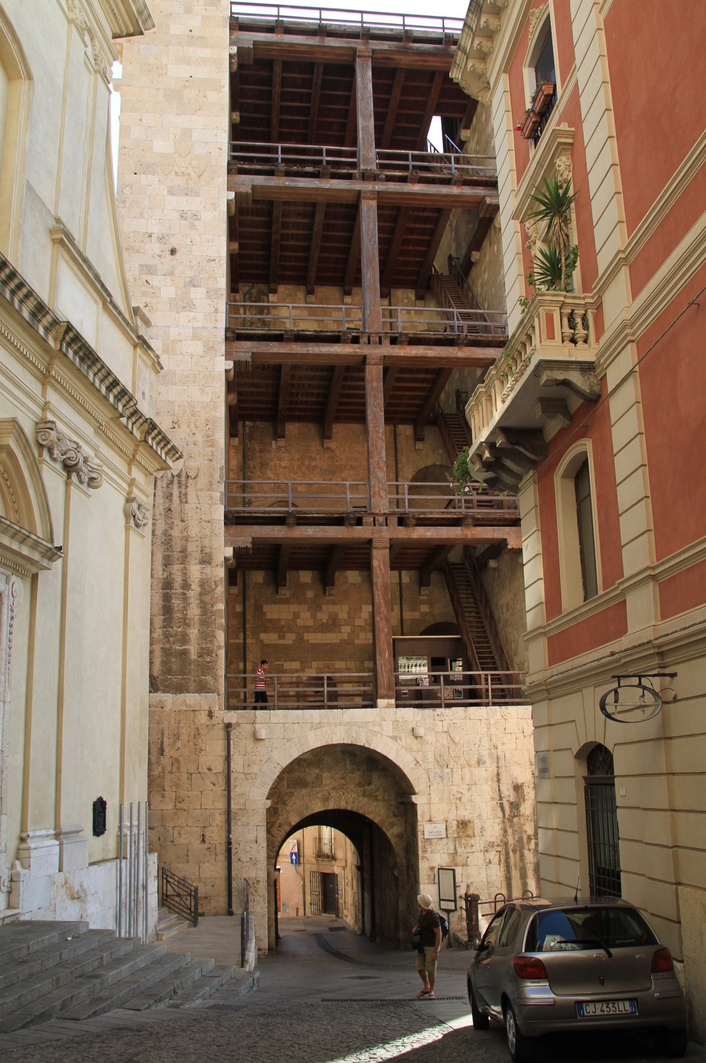 Torre dell'Elefante, Cagliari, Sardinia, Italy